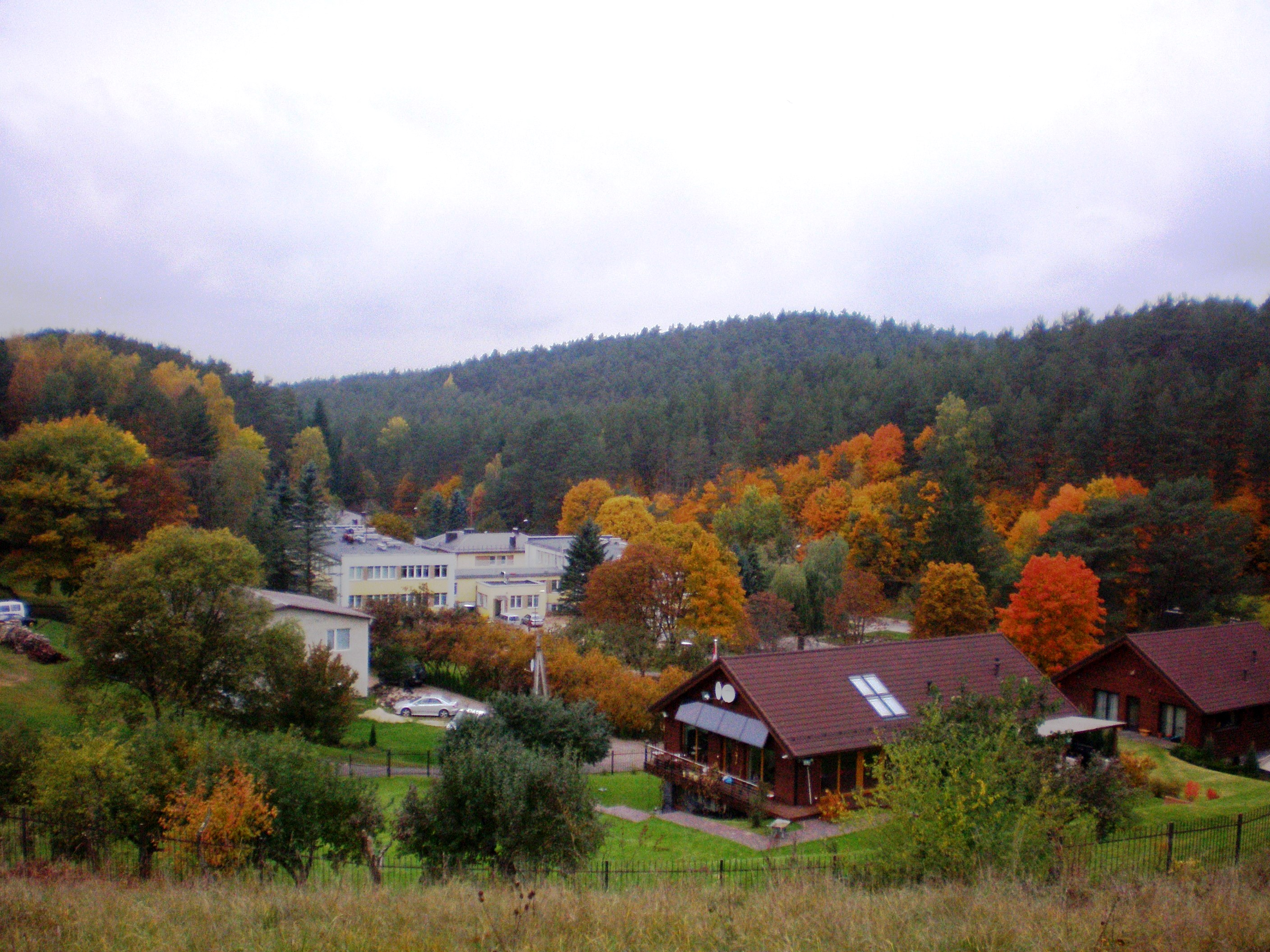 Žolyno gatvė nuo Pavilnių parko kalvų. Sapieginė, Vilnius